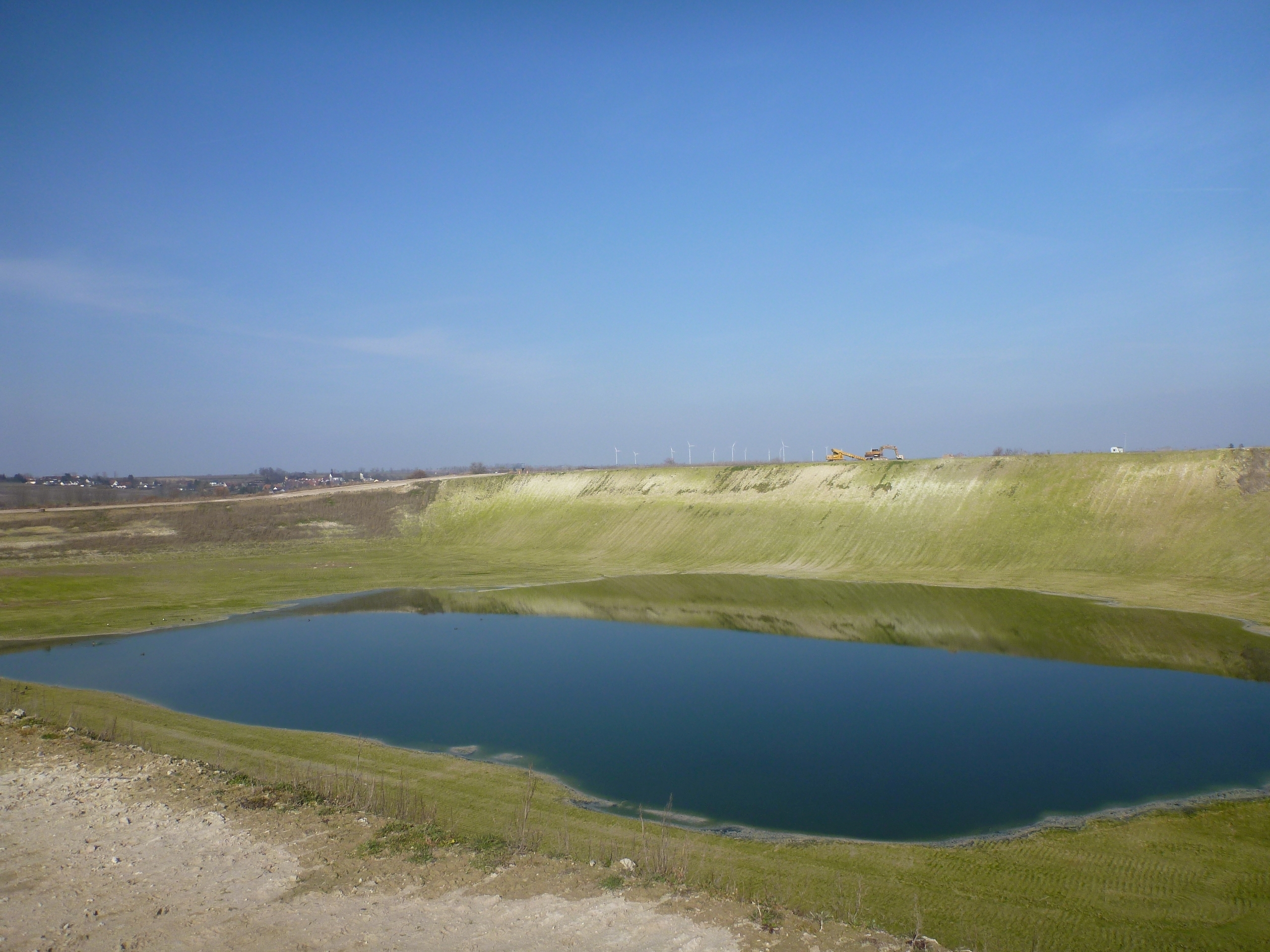 Klärteiche bei Offstein